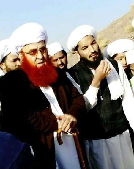 اسلامی لباس کا ایک نمونہ